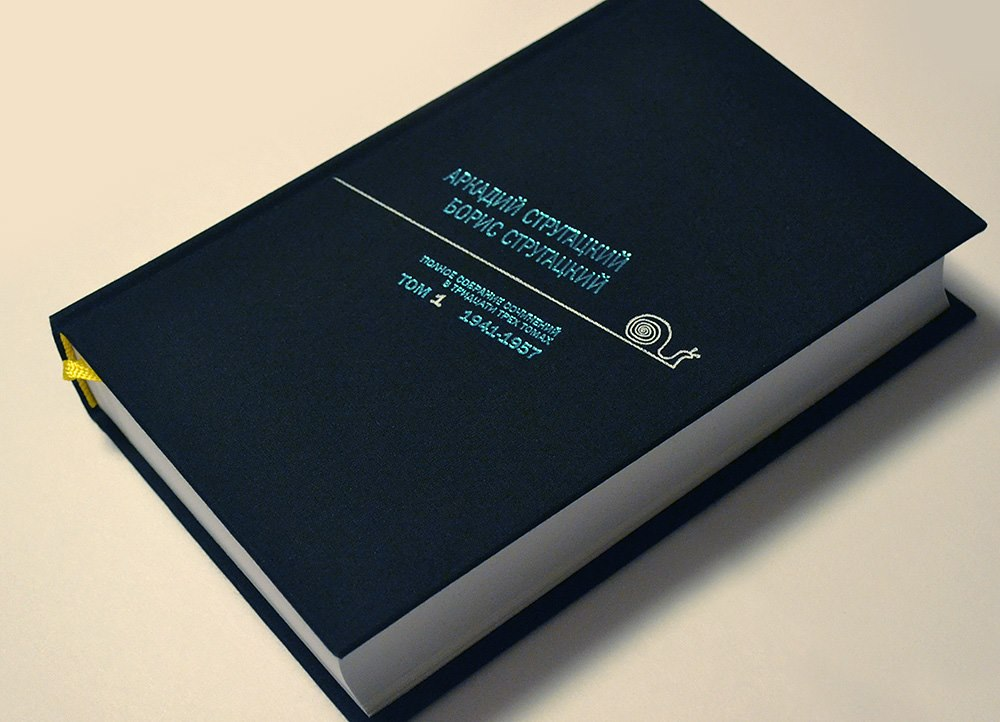 Обложка первого тома Стругацких.